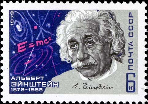 Почтовая марка СССР «100-летие со дня рождения Альберта Эйнштейна (1879—1955)», выпущенная 16 марта 1979 года. На марке изображён портрет учёного, его подпись, движение тел в пространстве, выведенная Эйнштейном формула E = m c 2 {\displaystyle E=mc^{2 . Художник — П. Бендель. Номер (ЦФА) — 4944. Тираж — 4,6 млн экз.